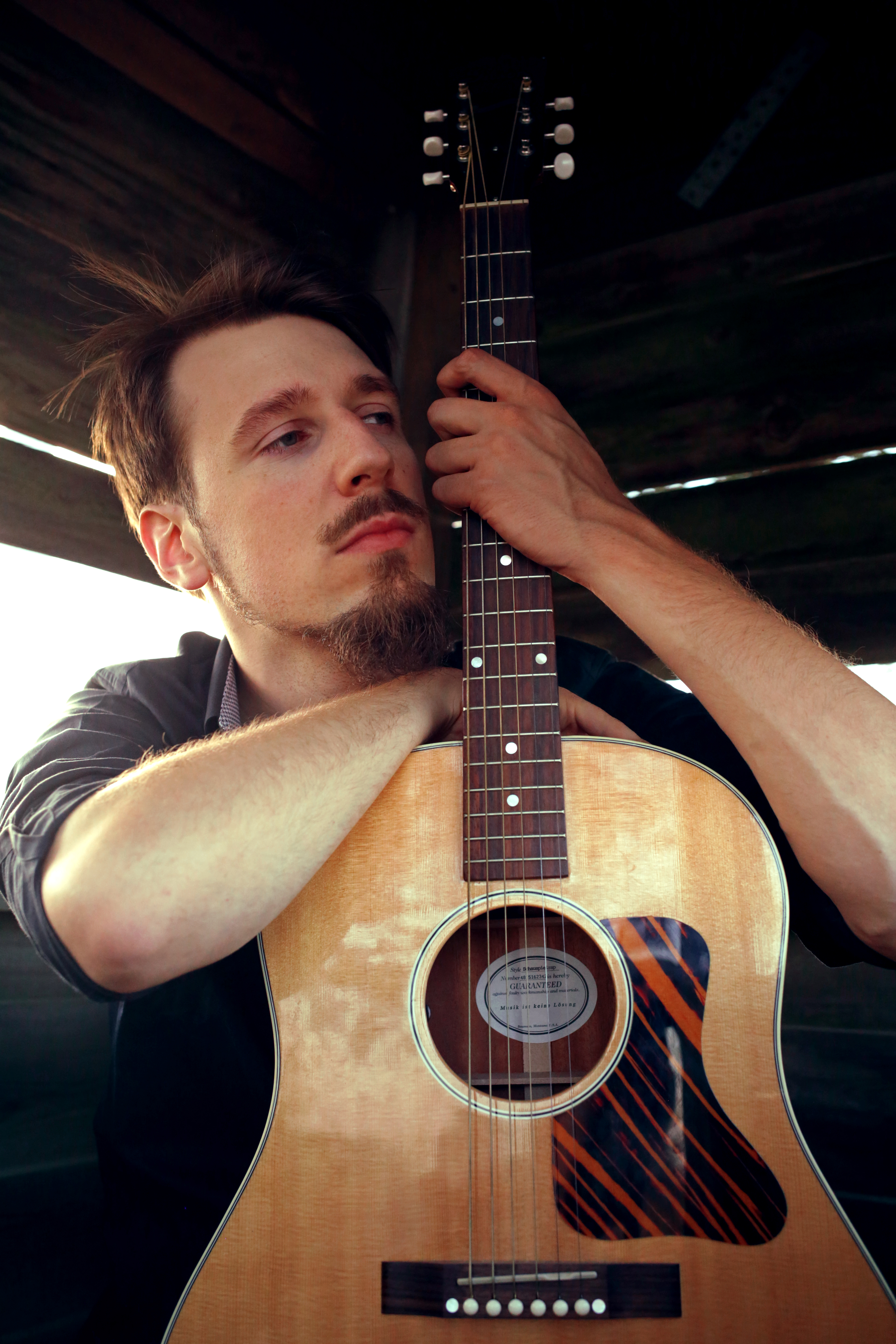 Pressefoto Alligatoahs (2015)